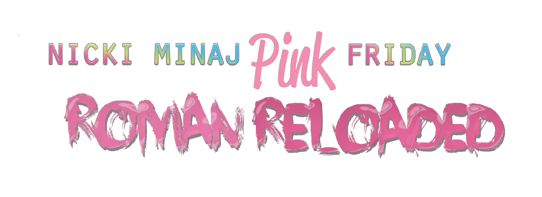 Logo del segundo álbum de Nicki Minaj